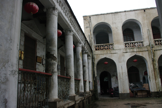 henan musem at kaifeng